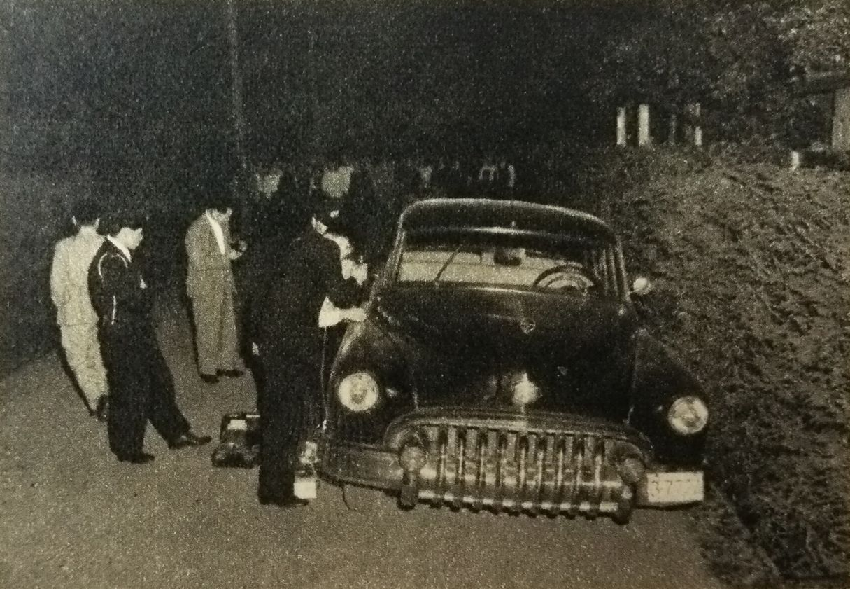 カービン銃ギャング事件で被害者の拉致に使用された車